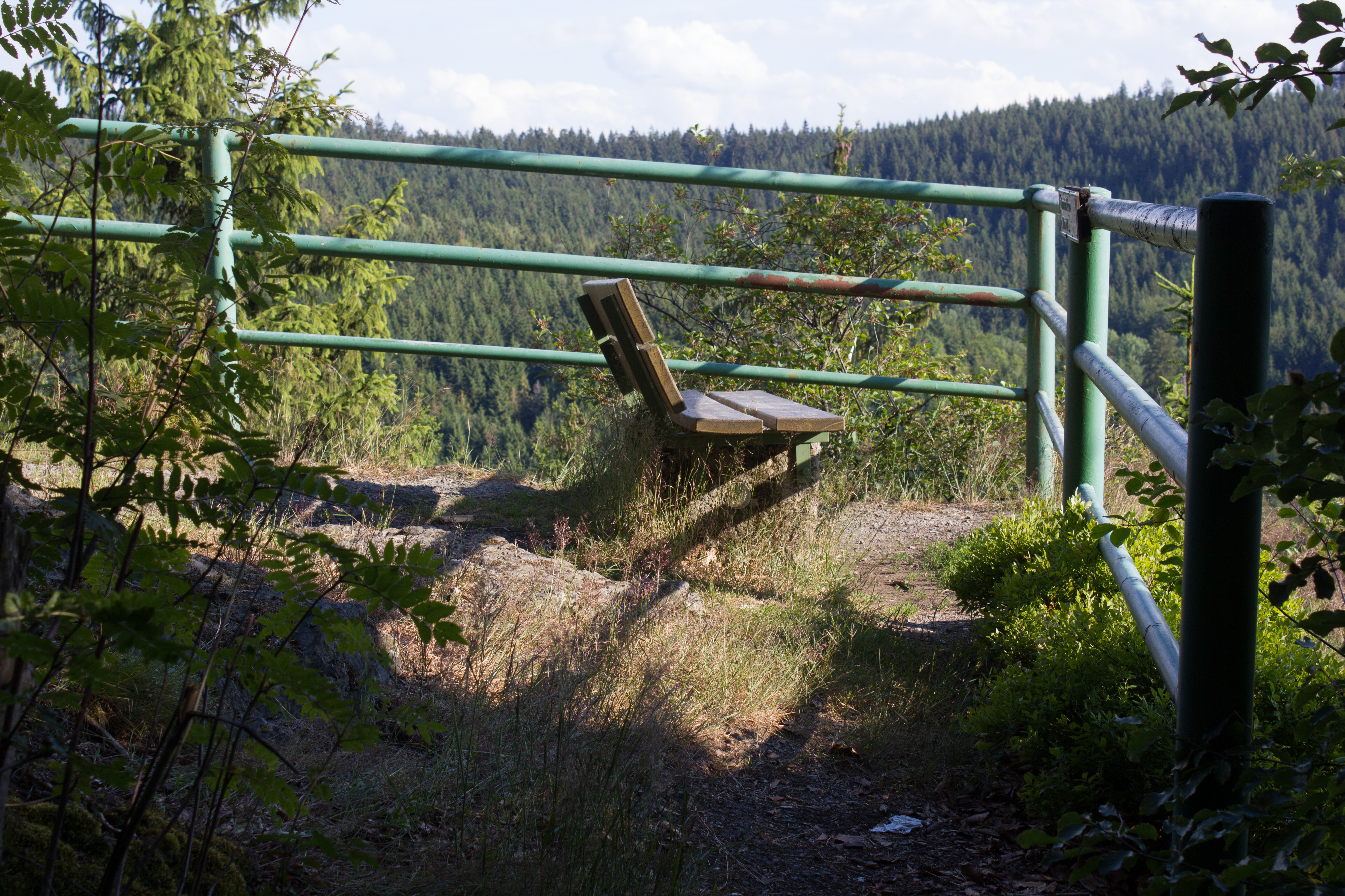 Kämmleinsfelsen südwestlich von Geroldsgrün, Geotop 475R002